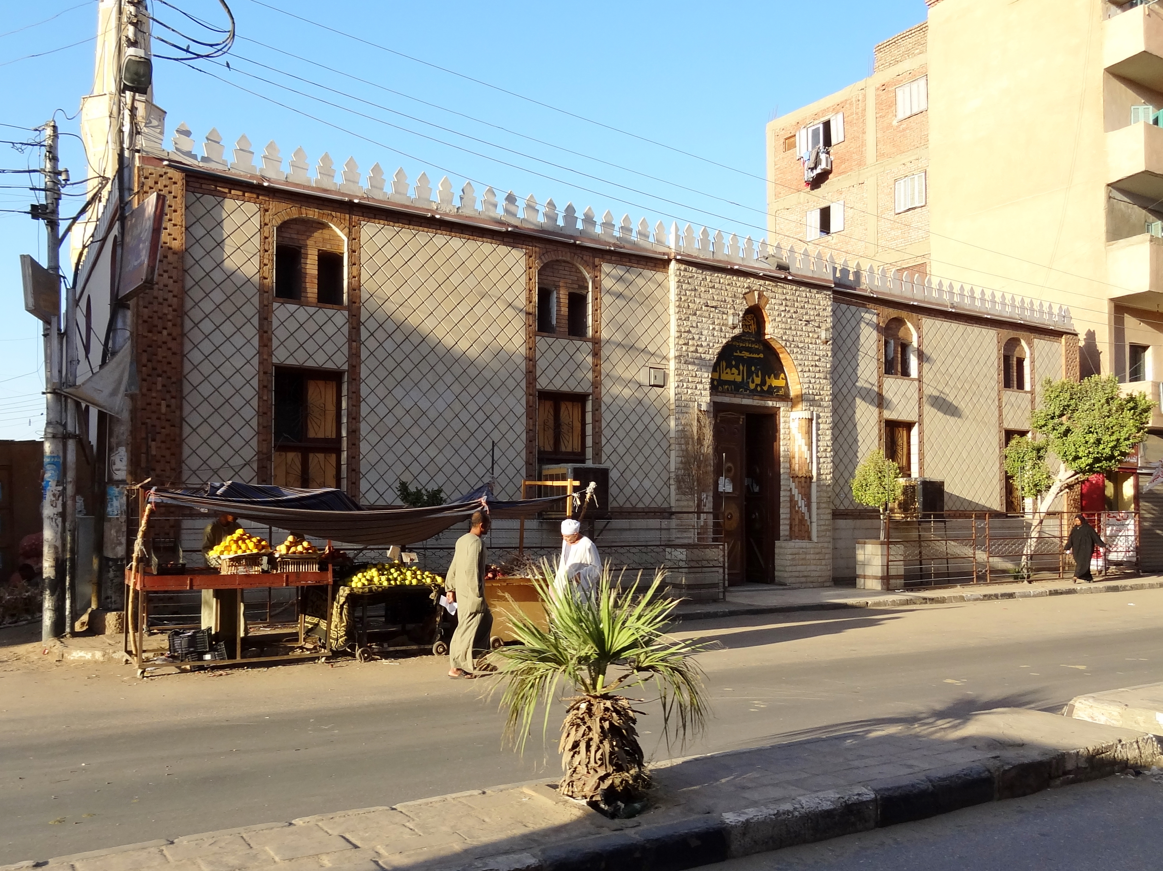 Straße in Edfu, Ägypten